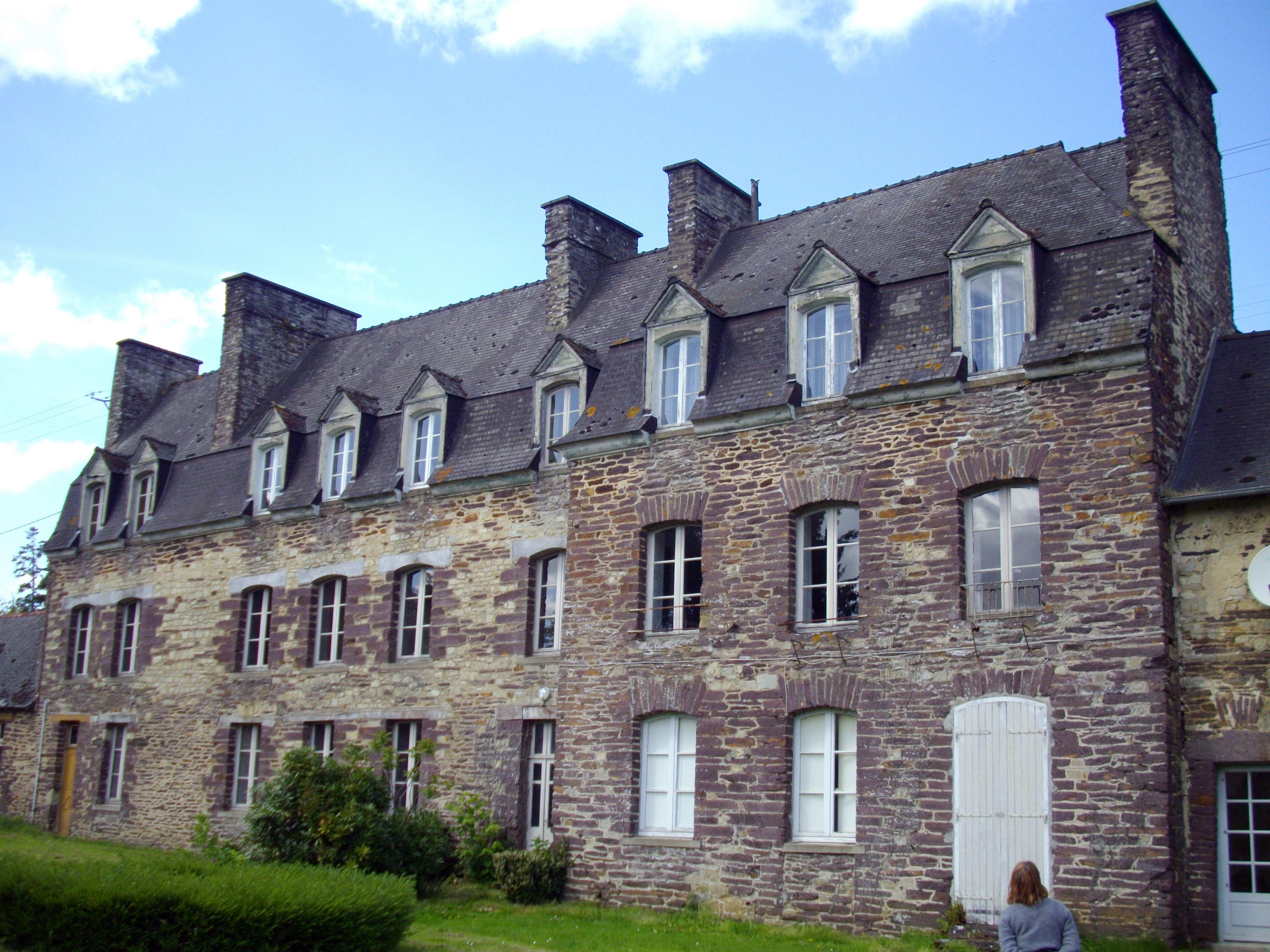 Logis du Maître de Forge